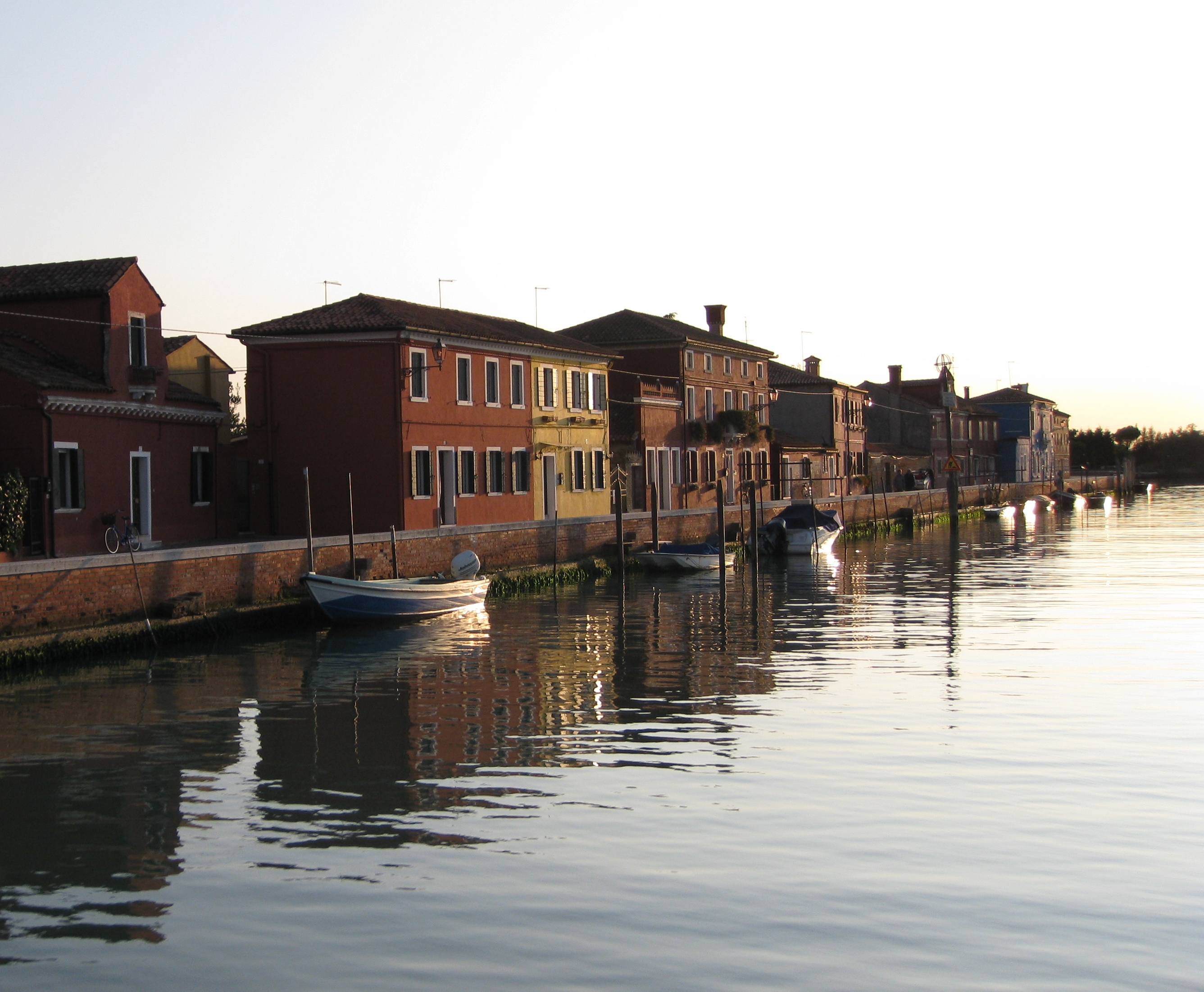 Canale di Mazzorbo